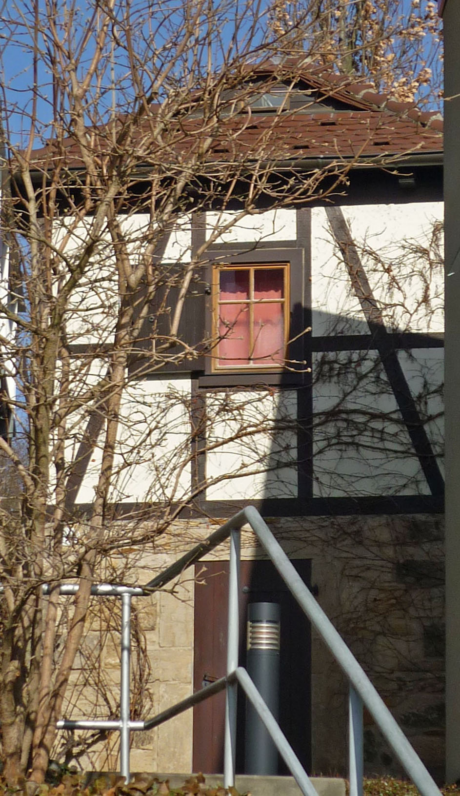 Kaitzer Weinberg 14b in Dresden-Kaitz (ehem. Weinlesehaus)